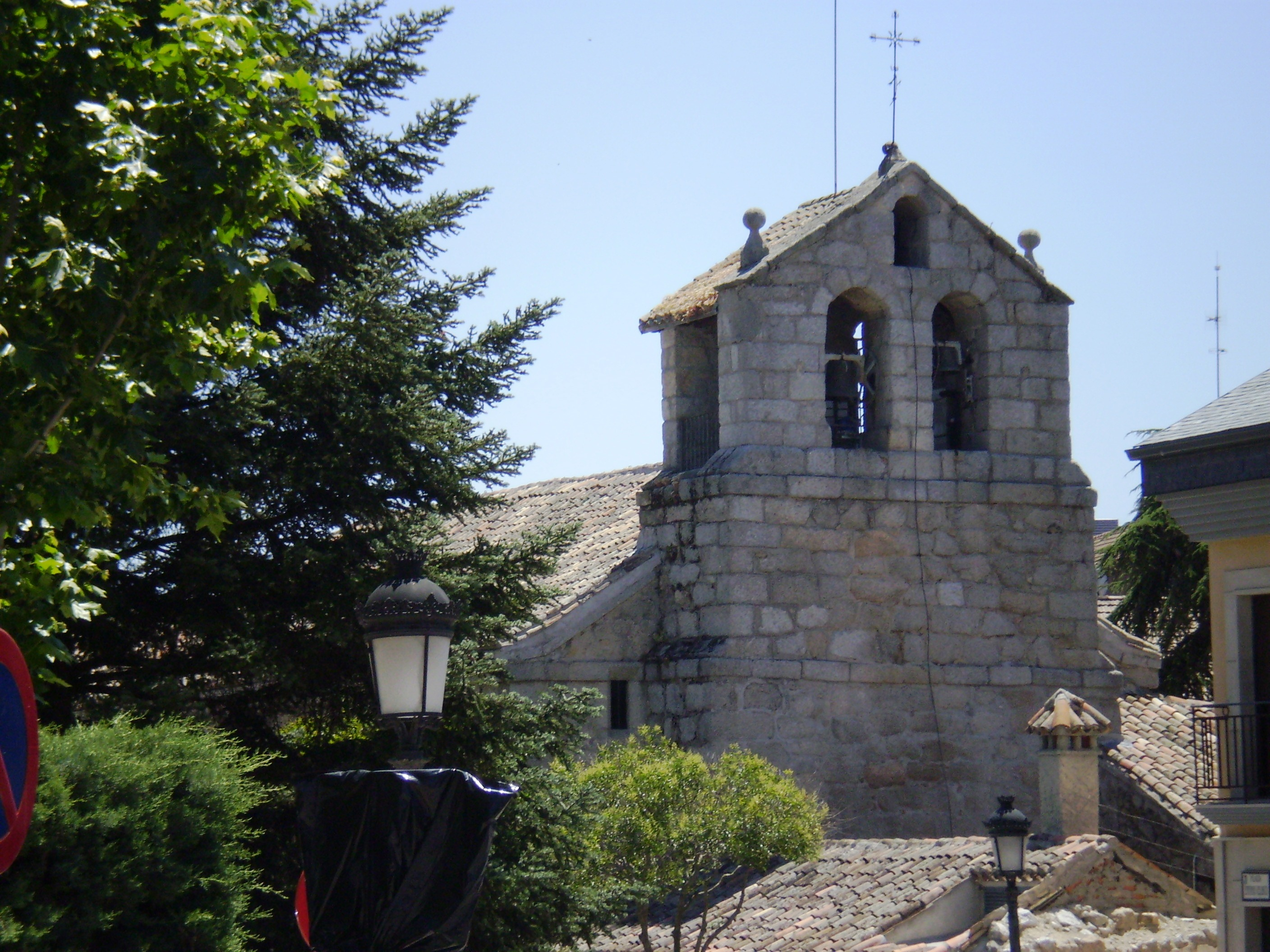 Iglesia de la Asunción de Nuestra Señora. Torrelodones, Madrid, Spain